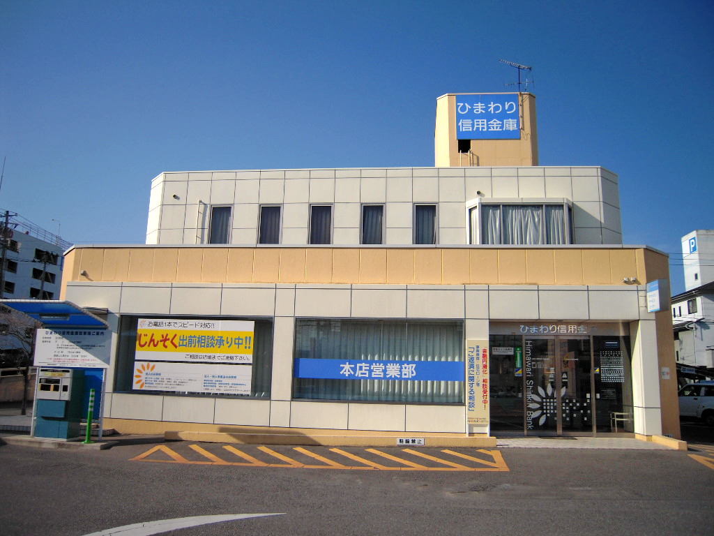 ひまわり信用金庫本店営業部